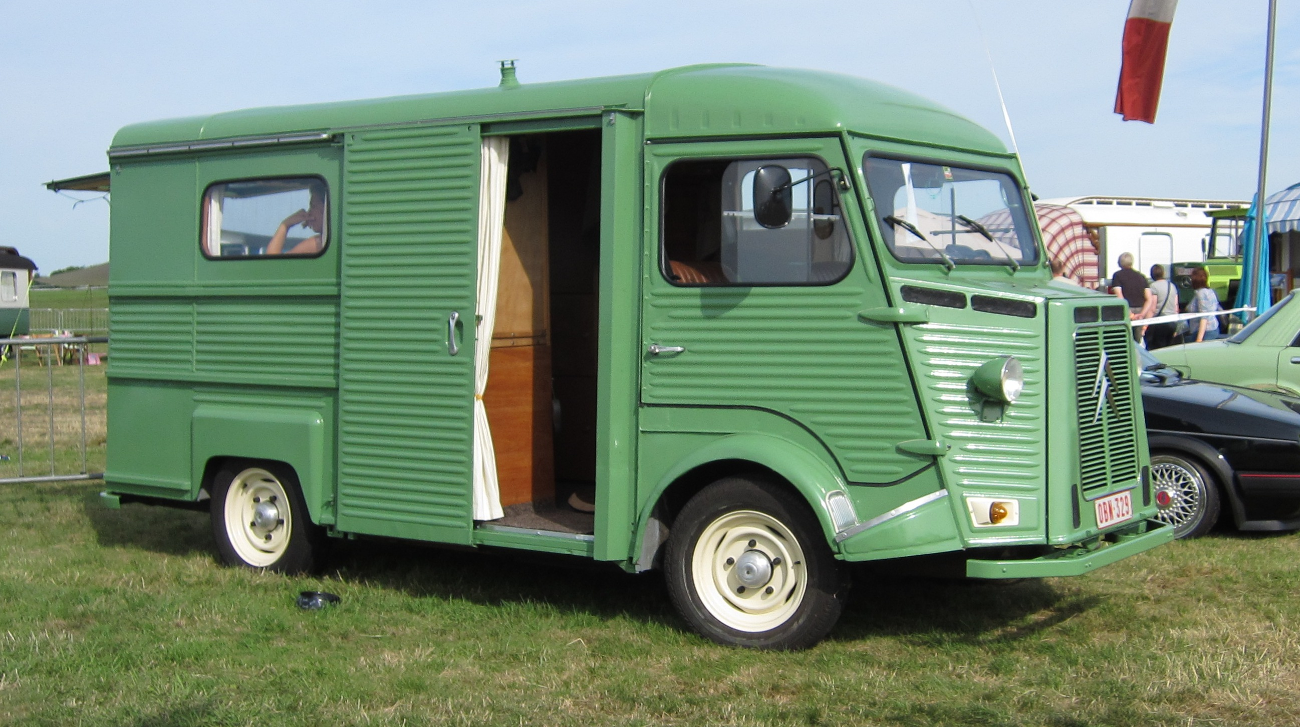 Citroën H